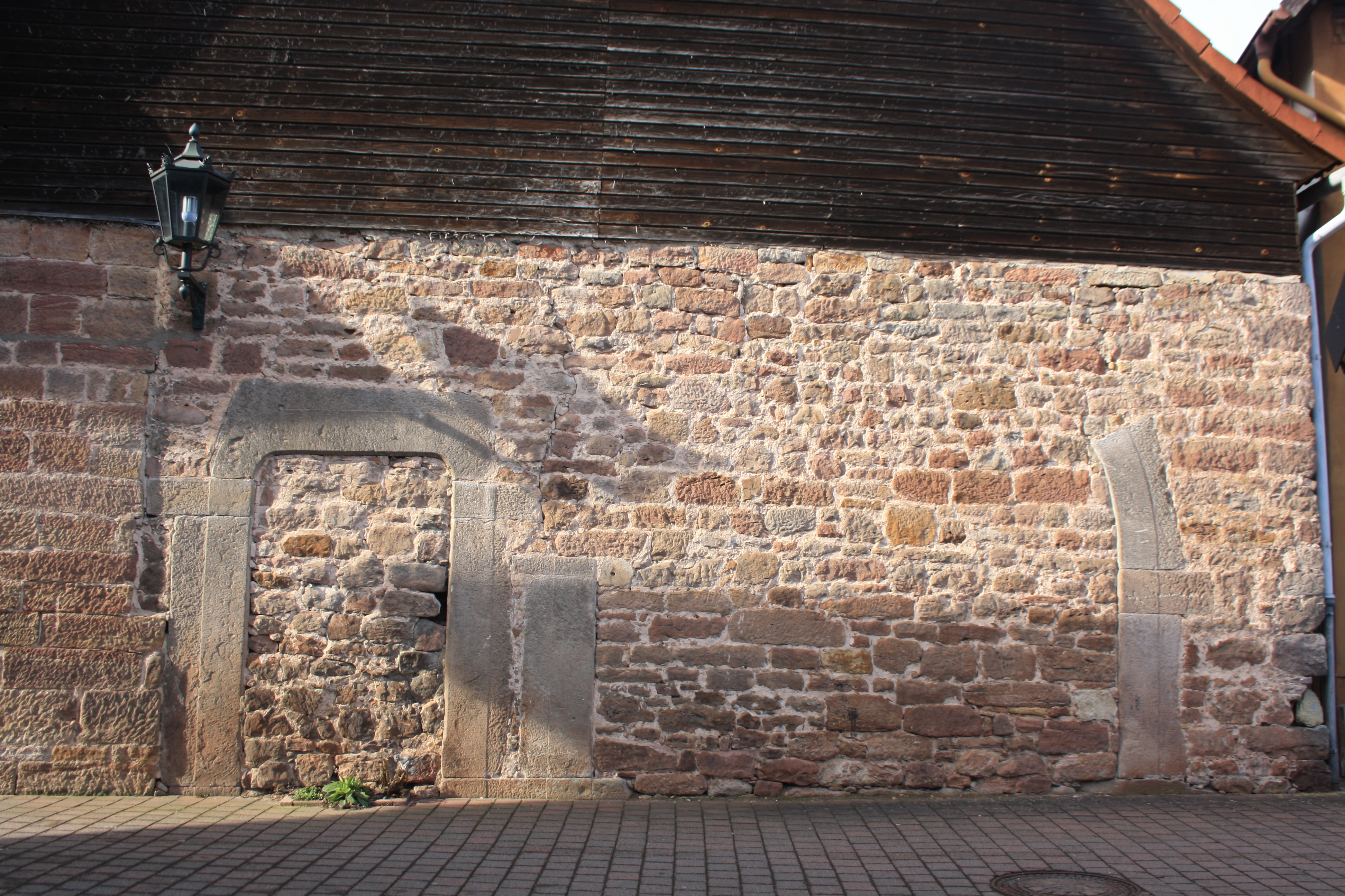 Sandsteinmauer mit erhaltenem Torbogen nahe dem Rathaus von Poppenhausen